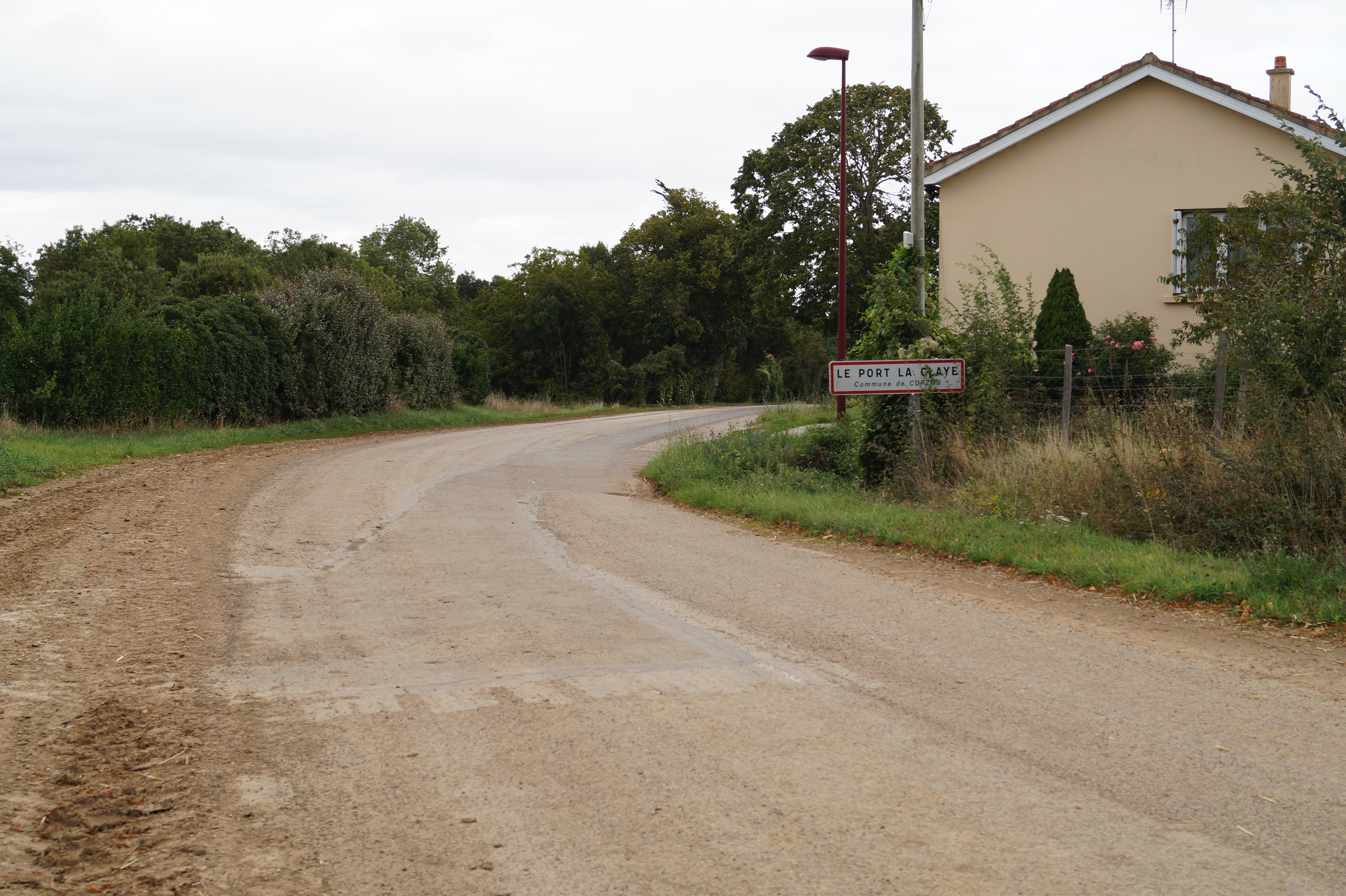 L’entrée d’agglomération du Port-la-Claye de la rue des Deux-Ponts.